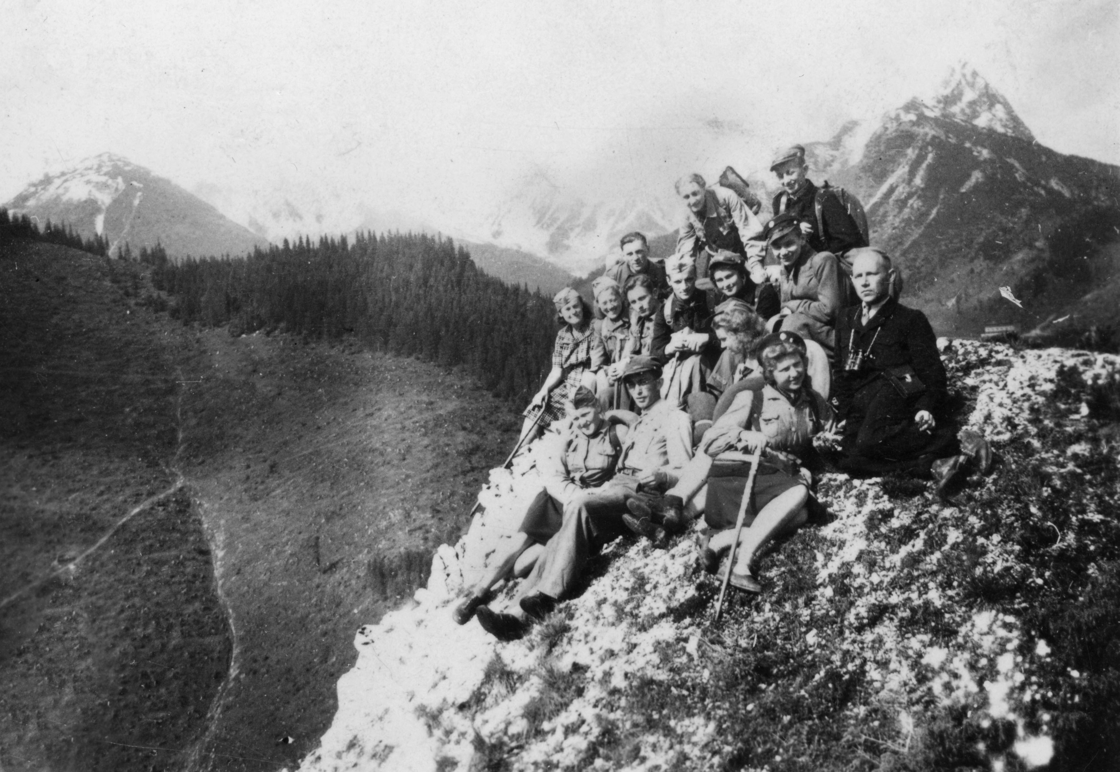 Wycieczka z uczniami z Łowicza